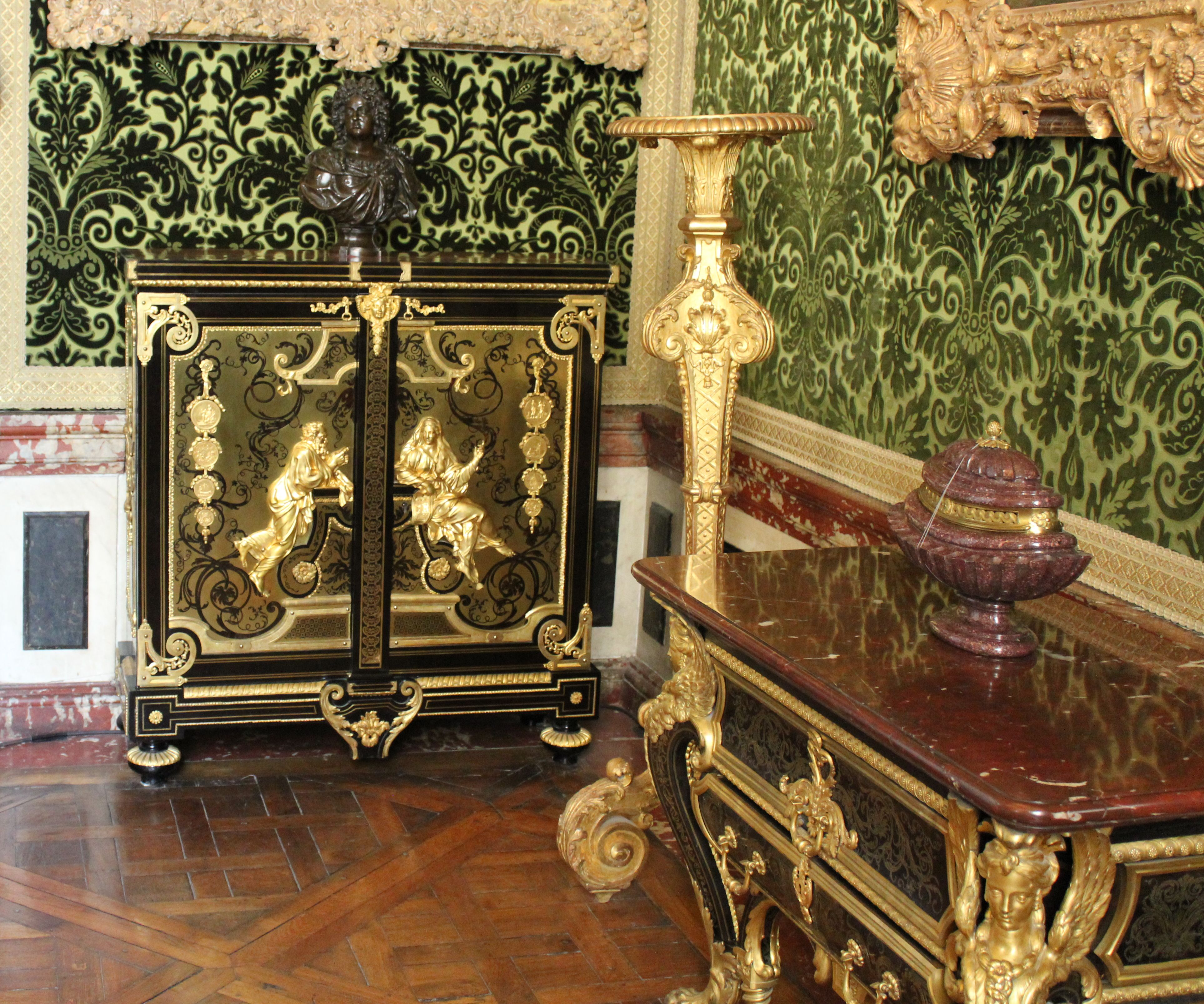 Château de Versailles, salon de l'abondance. Élément d'une paire.